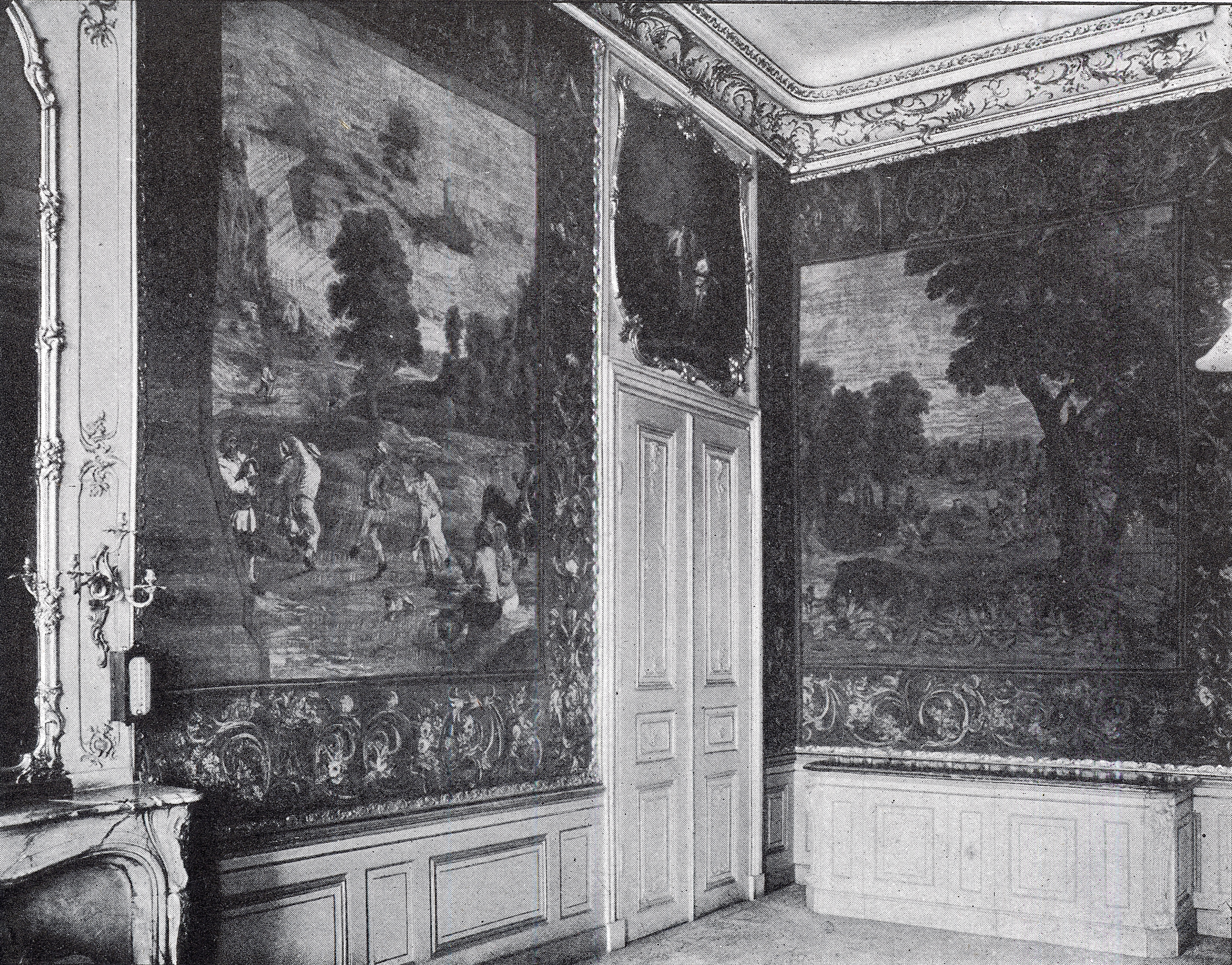 Dresden, Kurländer Palais, Gobelinsaal